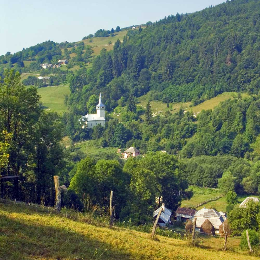 Cărpeniș, județul Alba, sat aparținător de Roșia Montană. Biserica de zid. Foto: Alexandru Baboș, iulie 2007.